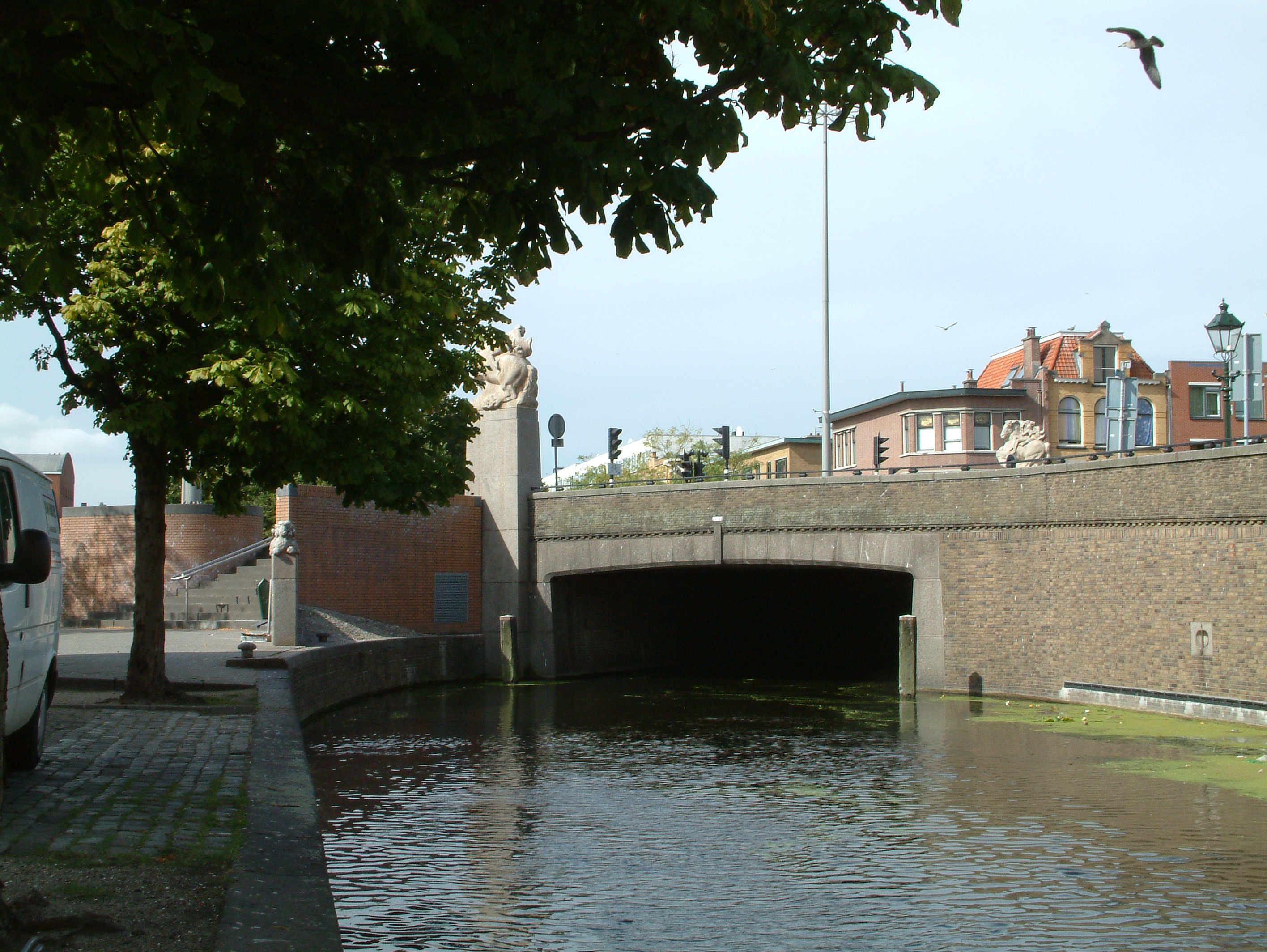 Brug in Den Haag